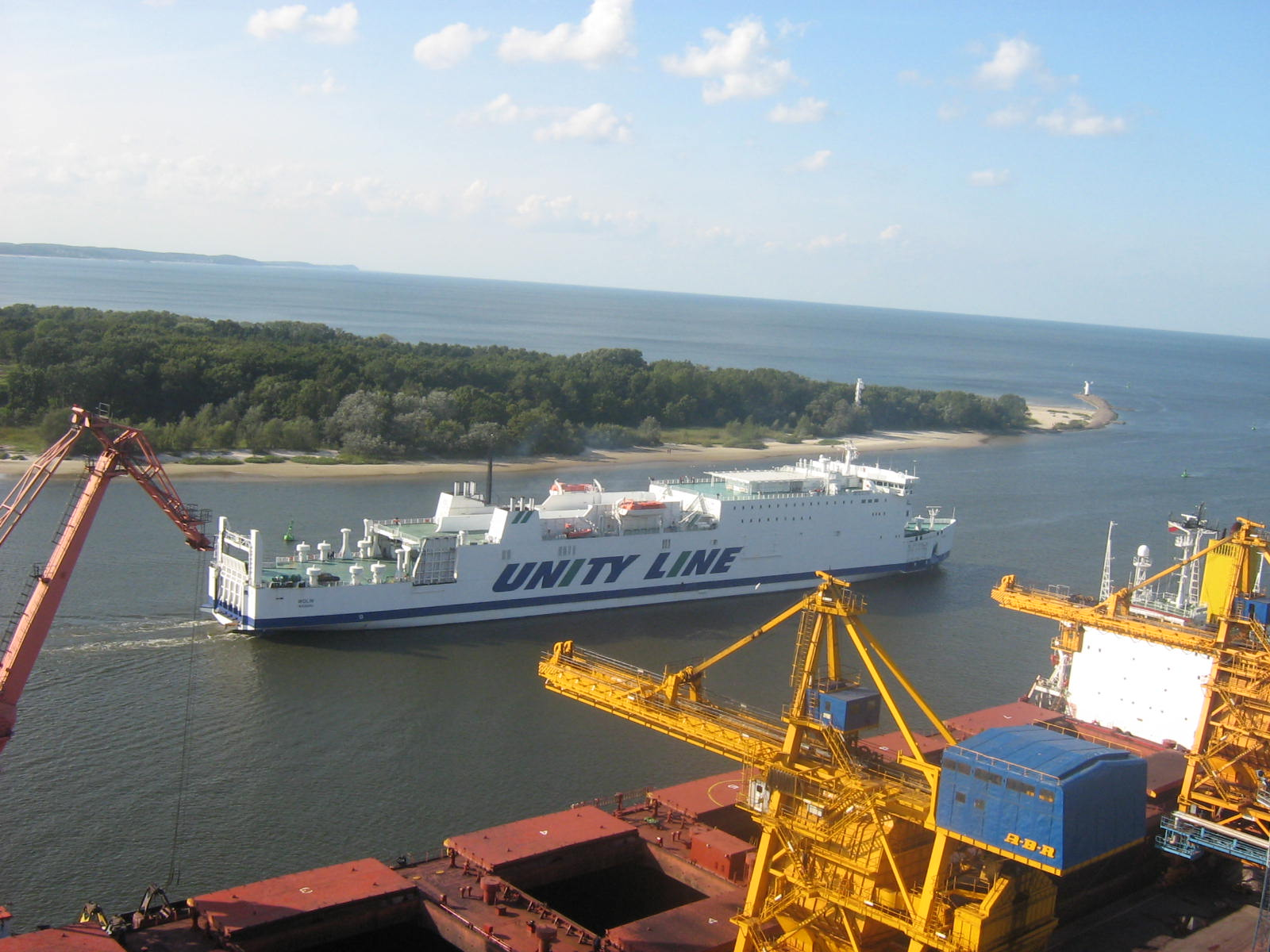 MF Wolin w Świnoujściu.